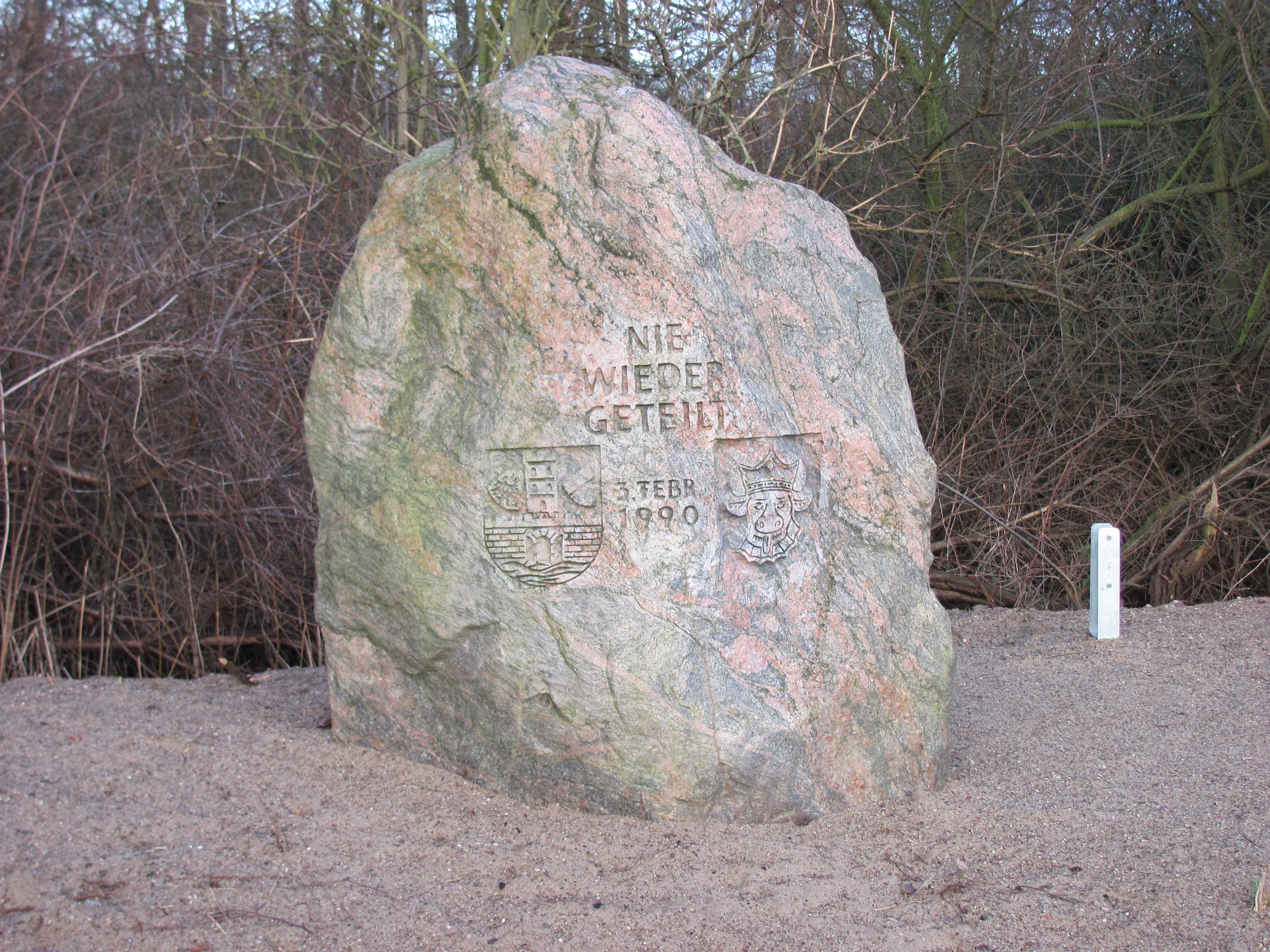 Gedenkstein zur Öffnung der ehemaligen innerdeutschen Grenze zwischen Schleswig Holstein und der ehemaligen DDR am Priwall im Februar 1990 mit der Aufschrift „NIE WIEDER GETEILT 3. FEBR 1990“ und den Wappen von Travemünde und Herzogtum Mecklenburg